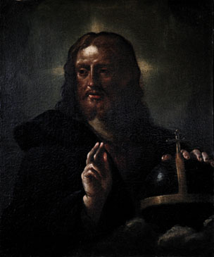 Redentor bendiciendotitle QS:P1476,es:"Redentor bendiciendo"